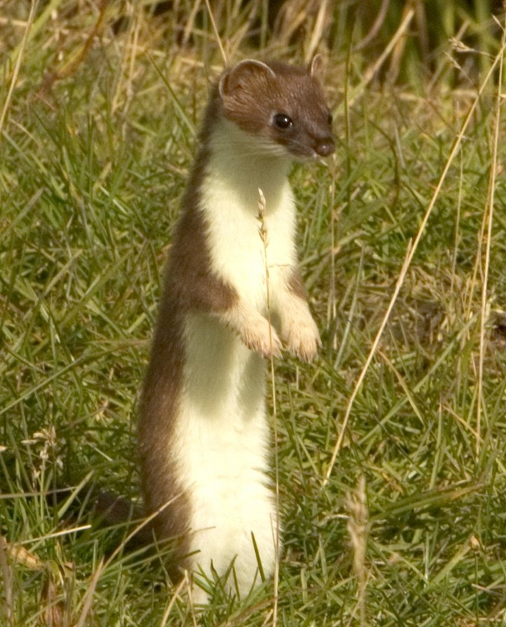 Armiño erguido con capa estival.